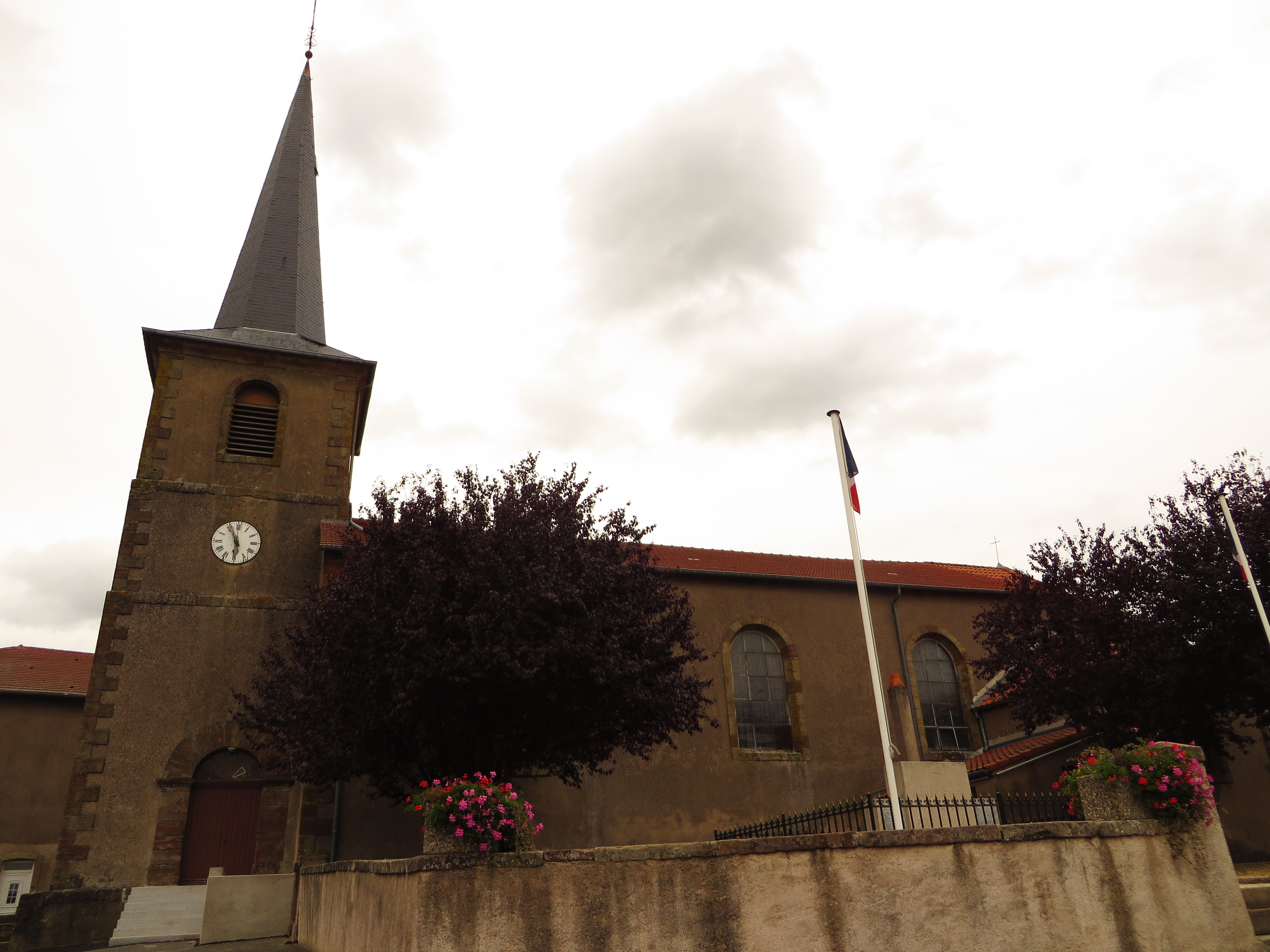 Bourgaltroff eglise